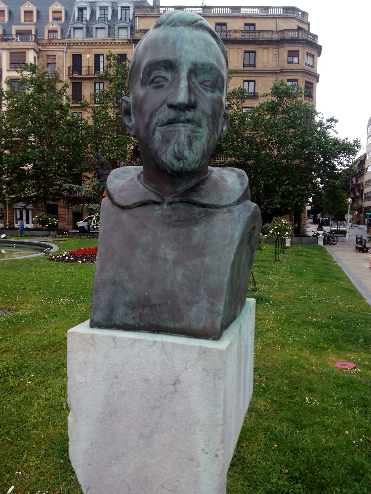 1974ko uztailaren 27an inauguratu zen. Lekarozeko Ikasle Ohien Elkarteak Jose Lopetegiri enkargatu zion obra, hasieran, baina hark egindako obra ez zitzaien egokia iruditu, eta zenbait urte geroago, Jose Maria Verak aldez aurretik egina zuen obra bat hautatu zuten; obra hori Aita Donostiaren artxibategiko jabegokoa zen. Hiriko Udalak oniritzia eman zuen eta hirian leku bat esleitu zion. Lekarozko Ikasle Ohien Elkarteak brontze-hustuketaren gastuak bere kargura hartu zituen eta Foru Aldundiak marmolezko oinazpiko bat eman zuen